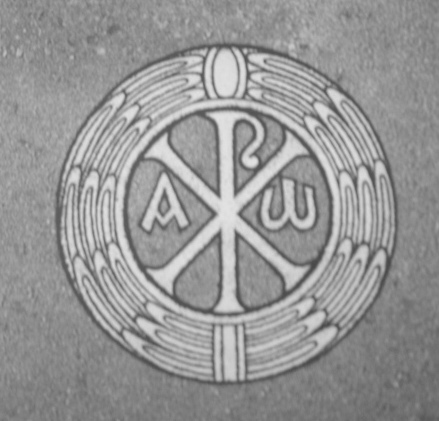 Mijn doopkaartje (hoop dat ie een beetje duidelijk is)